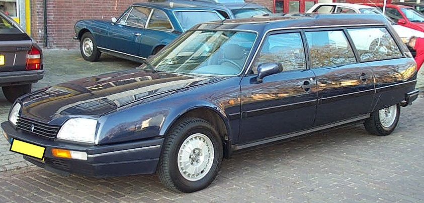 Citroen CX 2500 GTI Familiale 1990